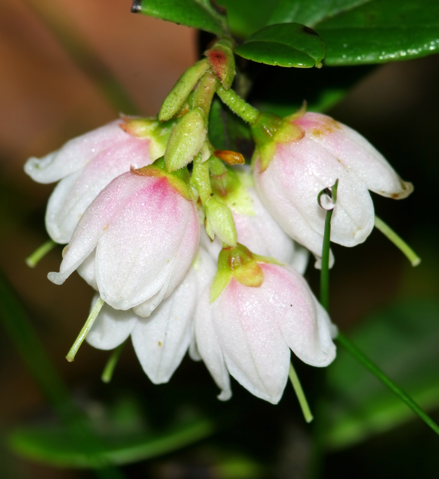 Borówka brusznica (Vaccinium vitis-idaea)